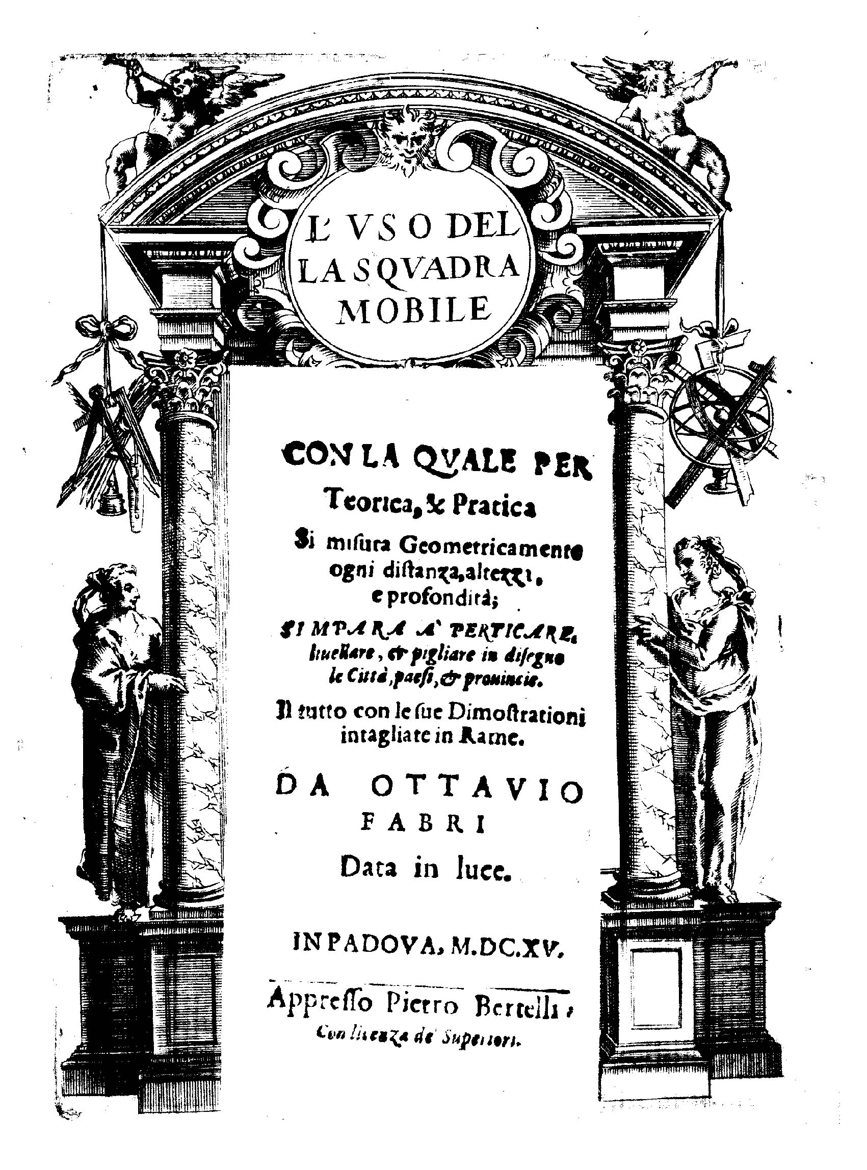 L' vso della squadra mobile con la quale per teorica, & pratica si misura geometricamente ogni distanza, altezza, e profondita; s'impara a perticare, liuellare, & pigliare in disegno le città, paesi & prouincie. Il tutto con le sue dimostrationi intagliate in rame. Da Ottauio Fabri data in luce. - In Padoua : appresso Pietro Bertelli, 1615. - 56, [4] c., [1] c. di tav. ripiegata : ill. calcografiche ; 4º .